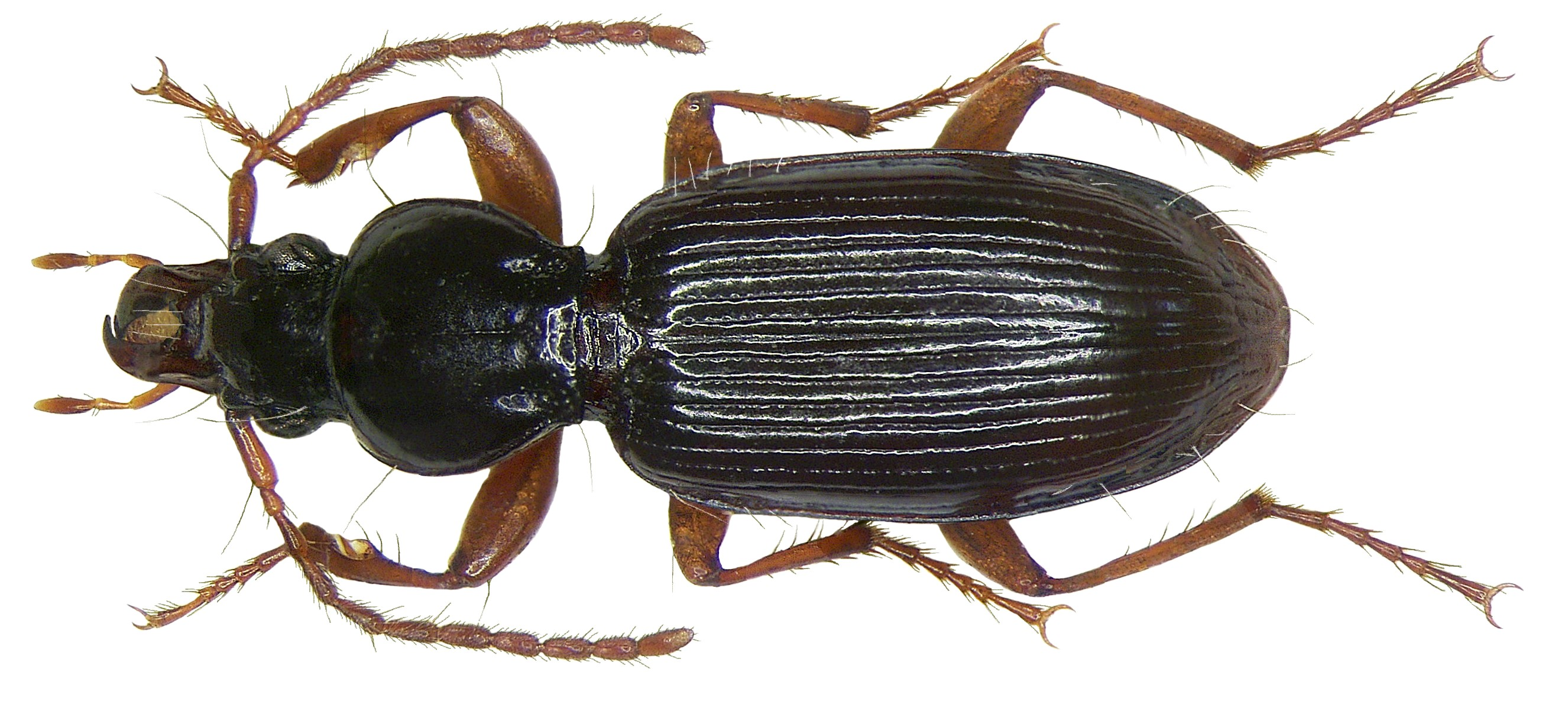 Familie: Carabidae Größe: 6,5-8,3 mm Verbreitung: Europa ohne den Norden, bis Kleinasien und den Kaukasus Ökologie: hygrophil, auf Lehmboden Fundort: Austria, Markthof leg.det. G.Rößler, 1997 Foto: U.Schmidt, 2008